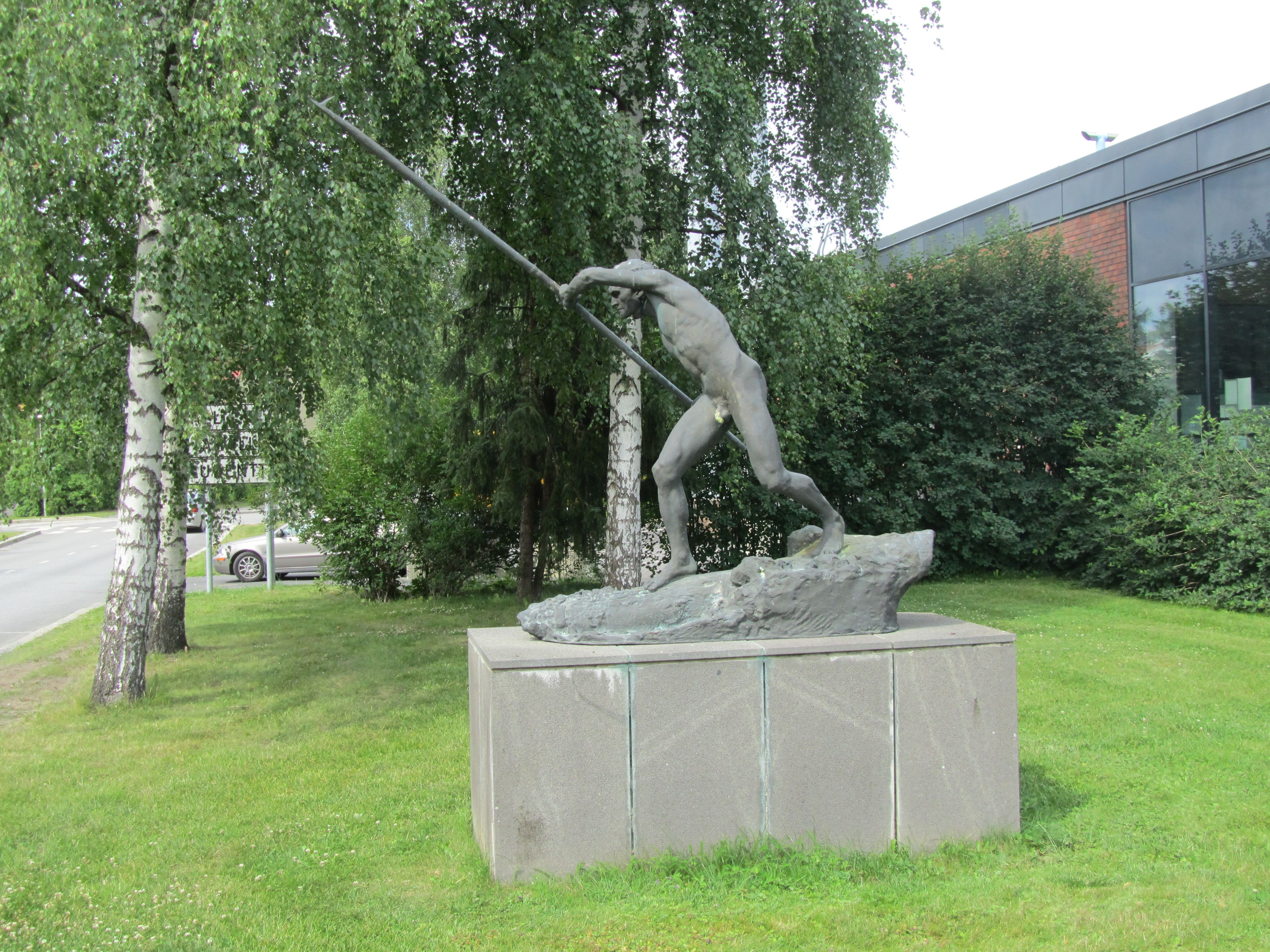 Tukinuittaja (1890) - Emil Wikström. Sijainti: Liikuntahalli